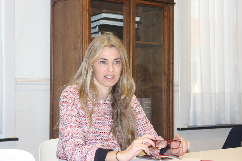 Anna Arqué